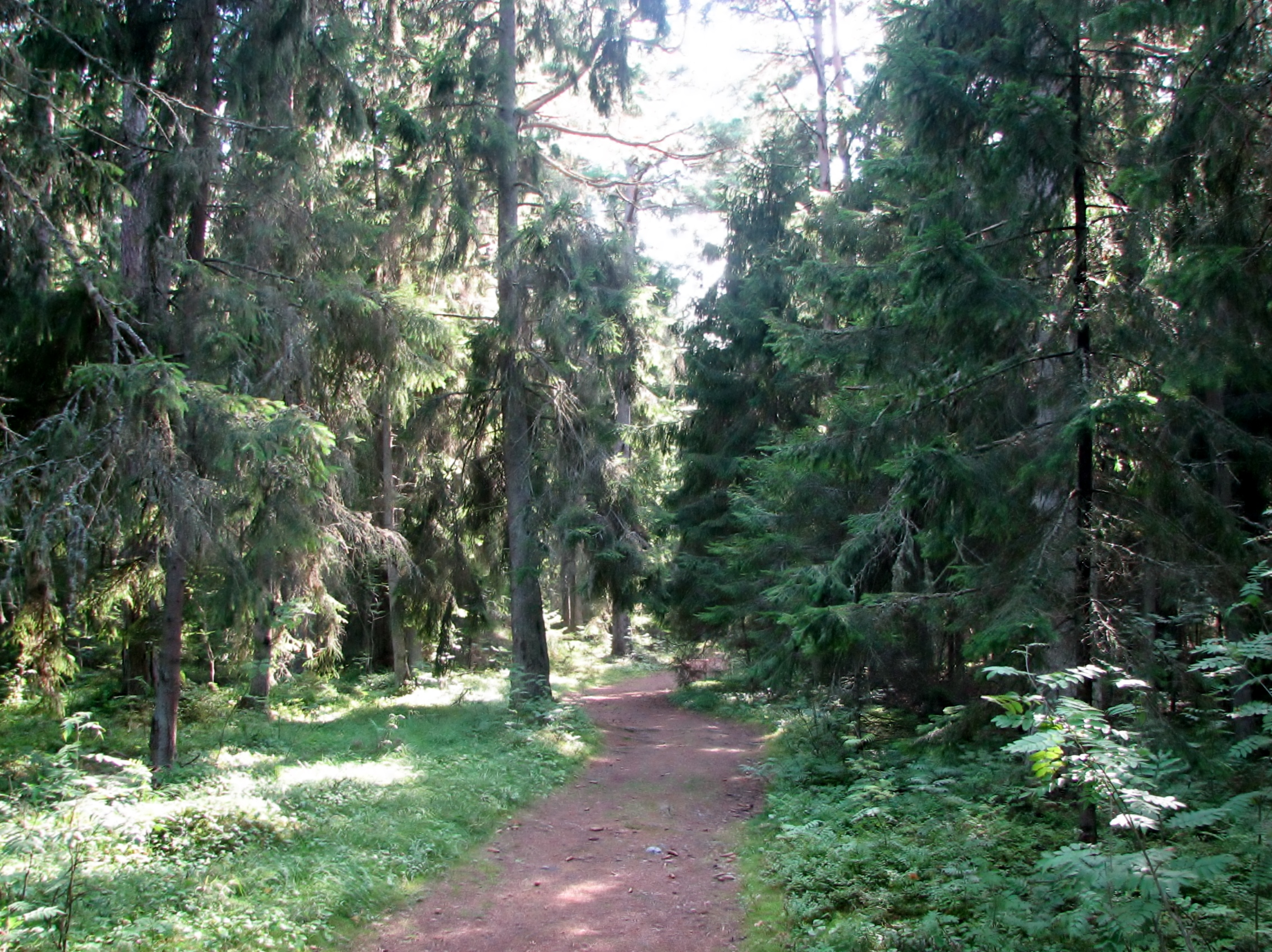 Tee Aegna maastikukaitseala Kurikneeme sihtkaitsevööndis